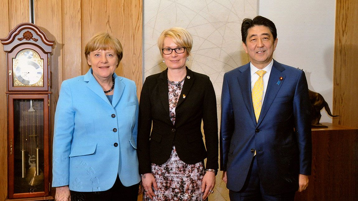 Frau Schnitzler zwischen Merkel und Shinzō Abe